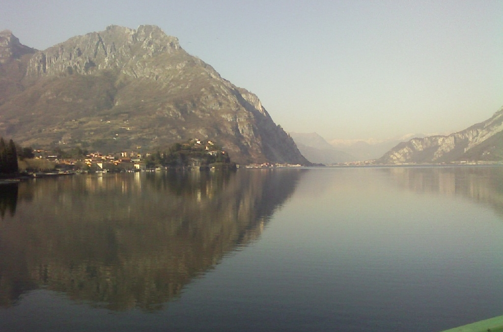 Vista del lago di Lecco (ramo di Lecco del lago di Como), dal ponte Kennedy tra Malgrate e Lecco (punto di scatto, approx: 45,8485; 9,3875).